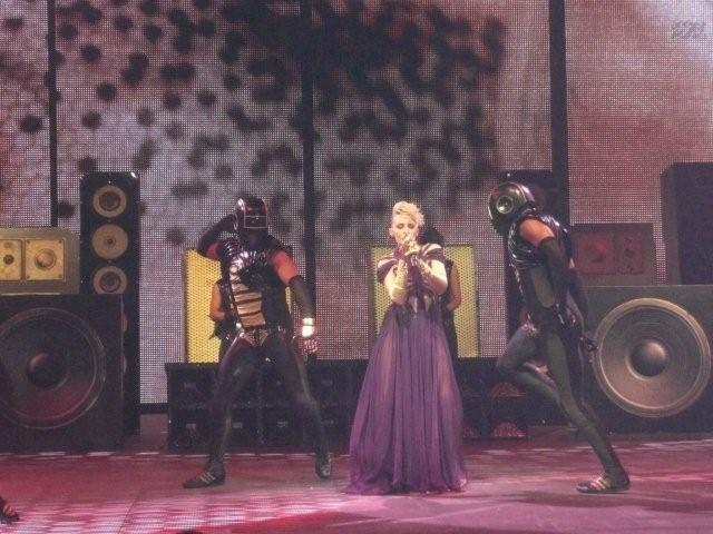 KylieX2008